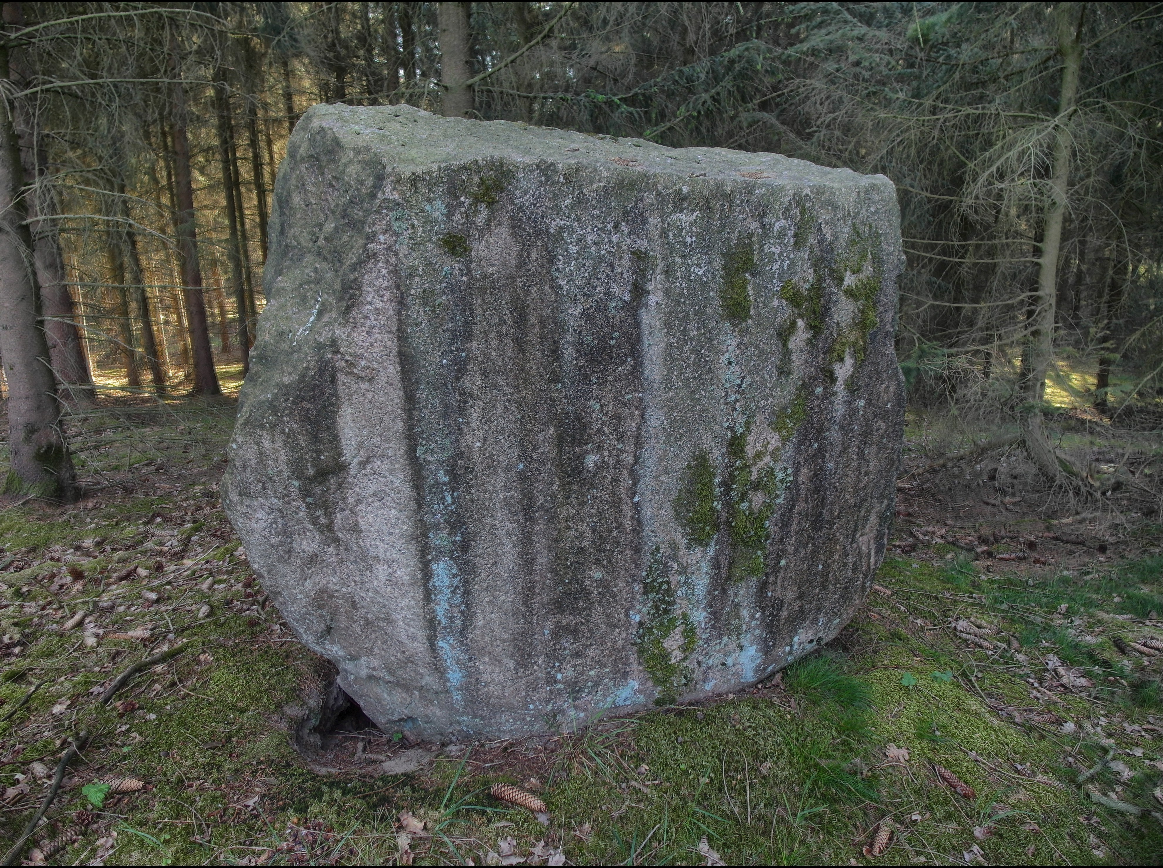 Quaderförmiger Rapakivi-Findling in Thölstedt